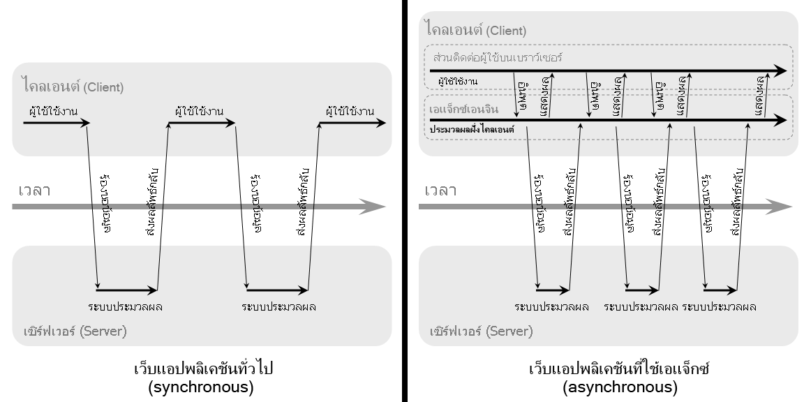 ภาพประกอบ AJAX อ้างอิงมาจากภาพภายในบทความของคุณ Jesse James Garrett เรื่อง Ajax: A New Approach to Web Applications ที่อยู่ของบทความ